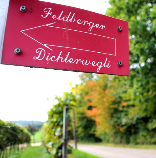 Wegweiser auf dem Feldberger Dichterwegli, einem Lehrpfad im Markgräflerland, auf dem Gedichtstafeln mit Versen alemannischer Mundartdichter zu sehen sind.